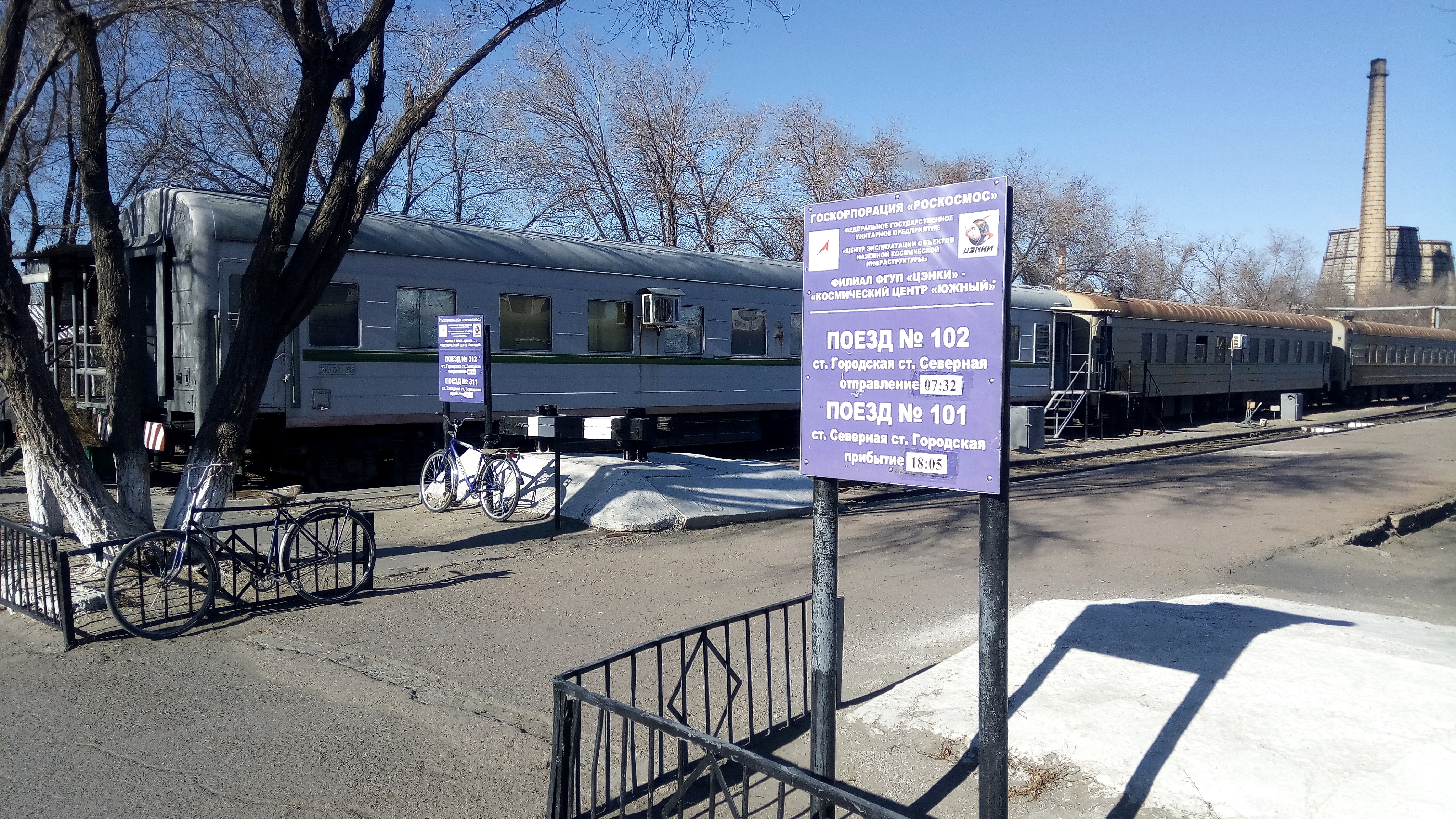 Станция «Городская» (Байконур)